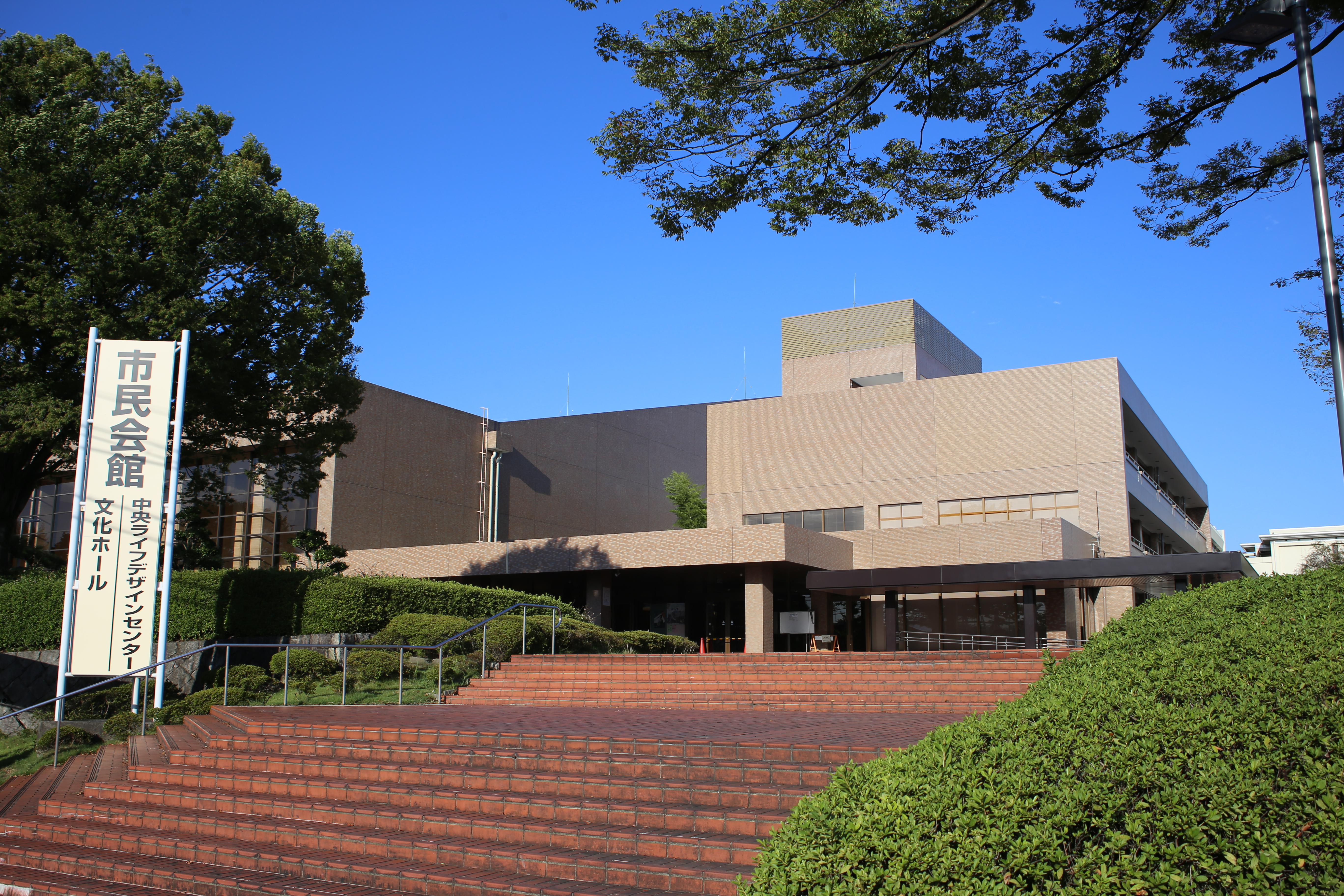 各務原市蘇原中央町の各務原市民会館